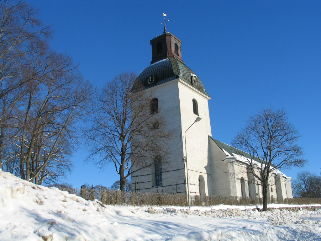 Ovansjö kyrka i Kungsgården